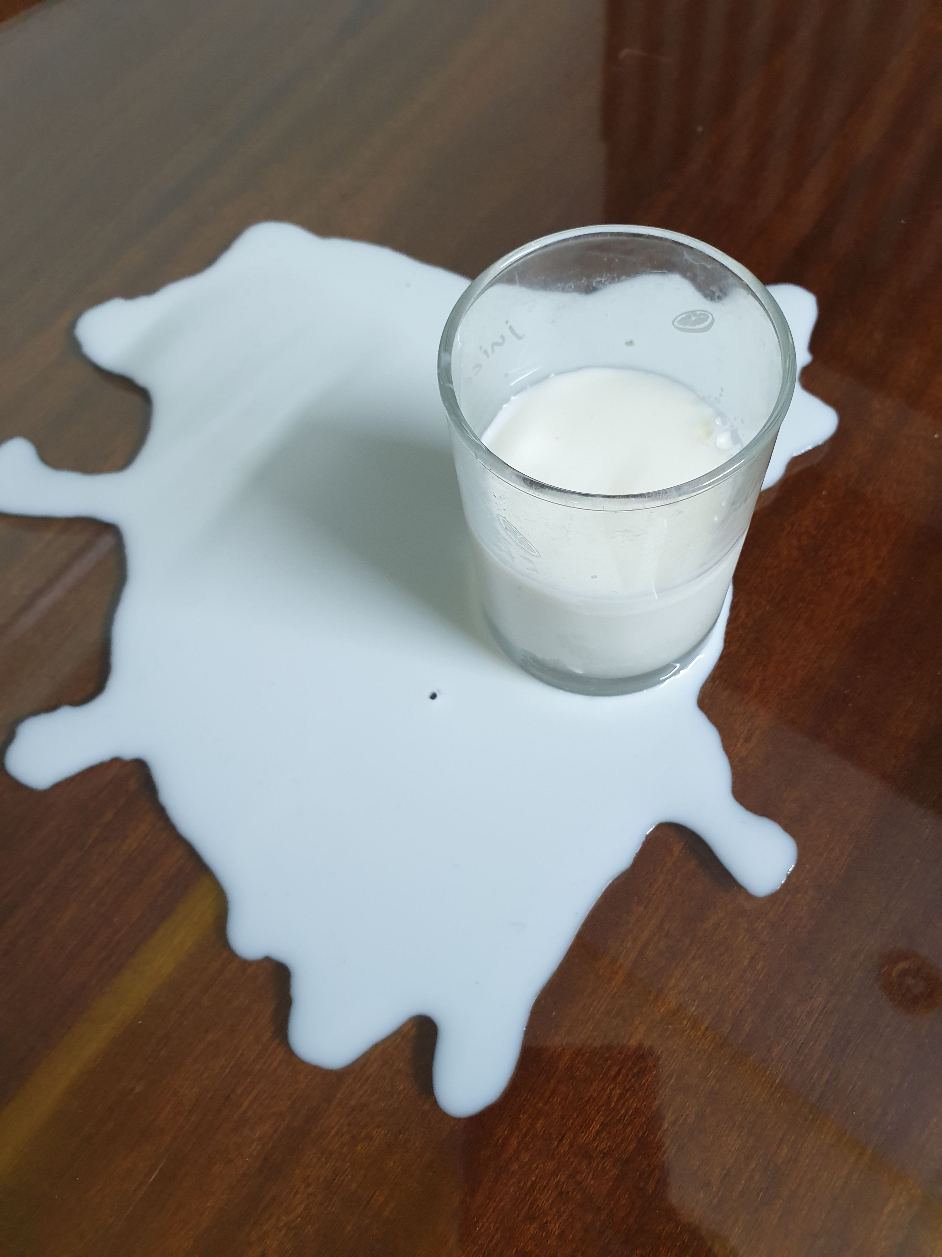 Cốc sữa